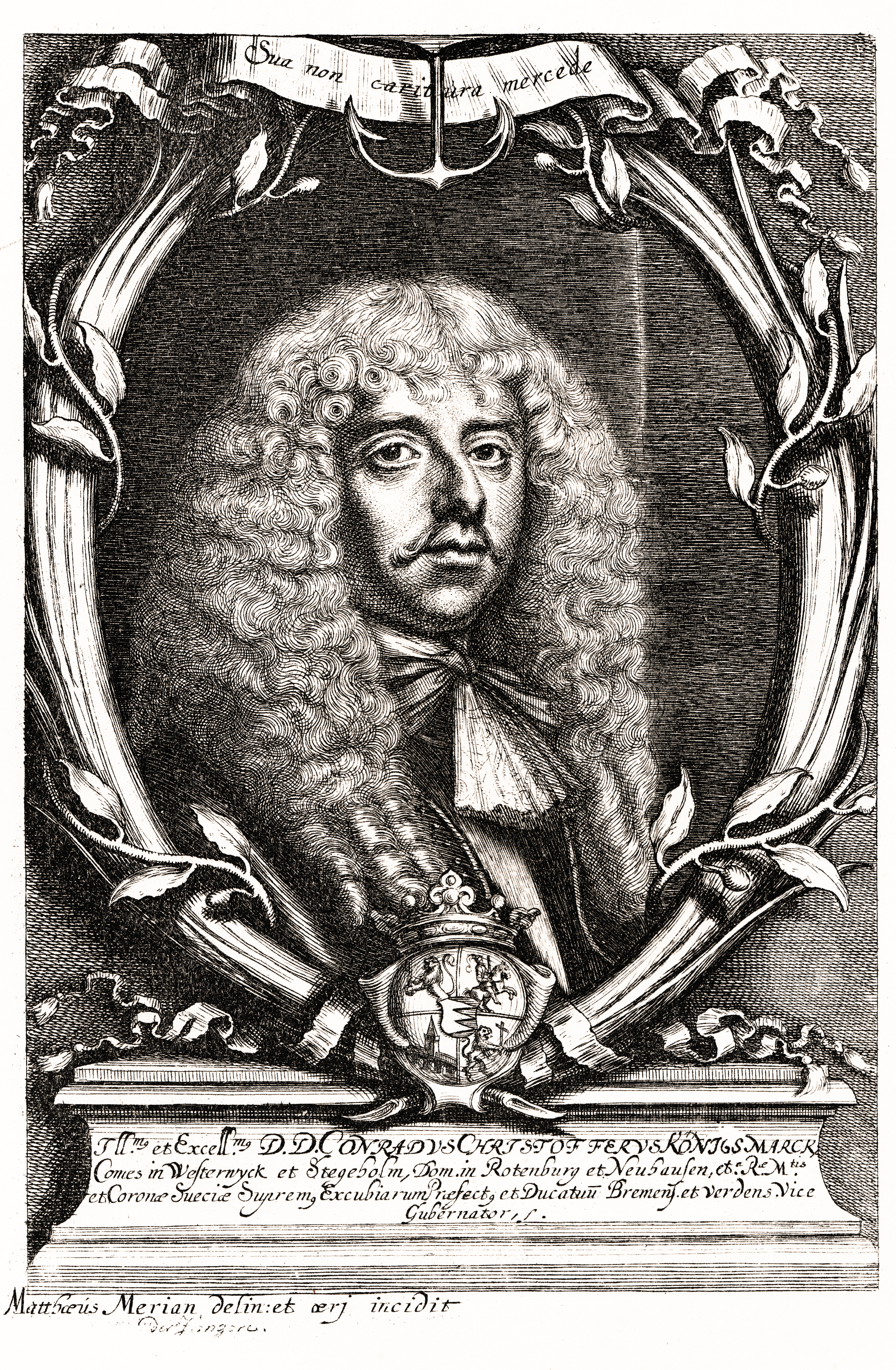 Conrad Christoff von Königsmarck (1634-1673). Kopparstick utfört av Mathias Merian d. y. Tvenne anonyma graverade porträtt af Conrad Christoffer K. hafva samma typ som detta ehuru omvända; det ena är ordnadt som byst på en sockel.